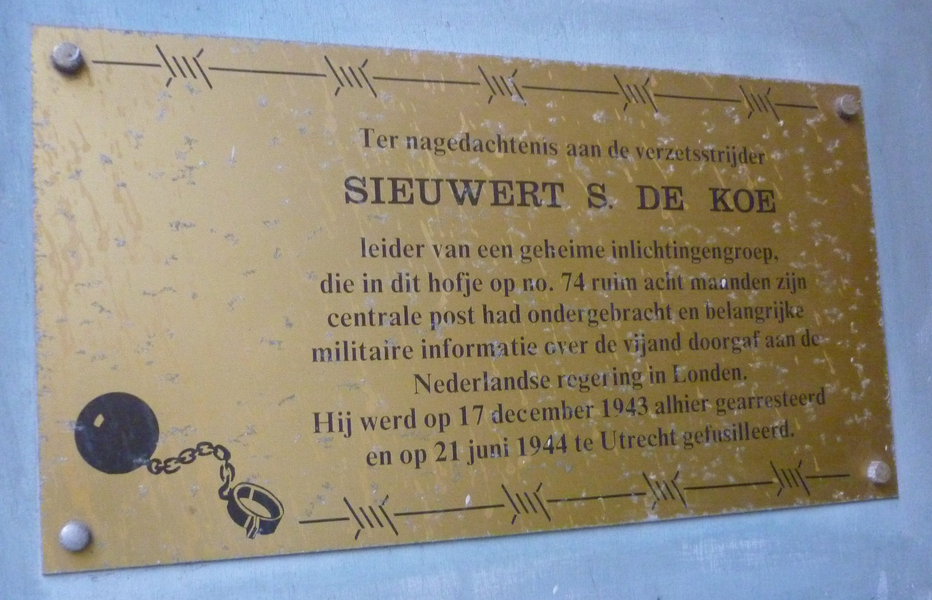 Siewert de Koe, herdenkingsbord, Denneweg Den Haag